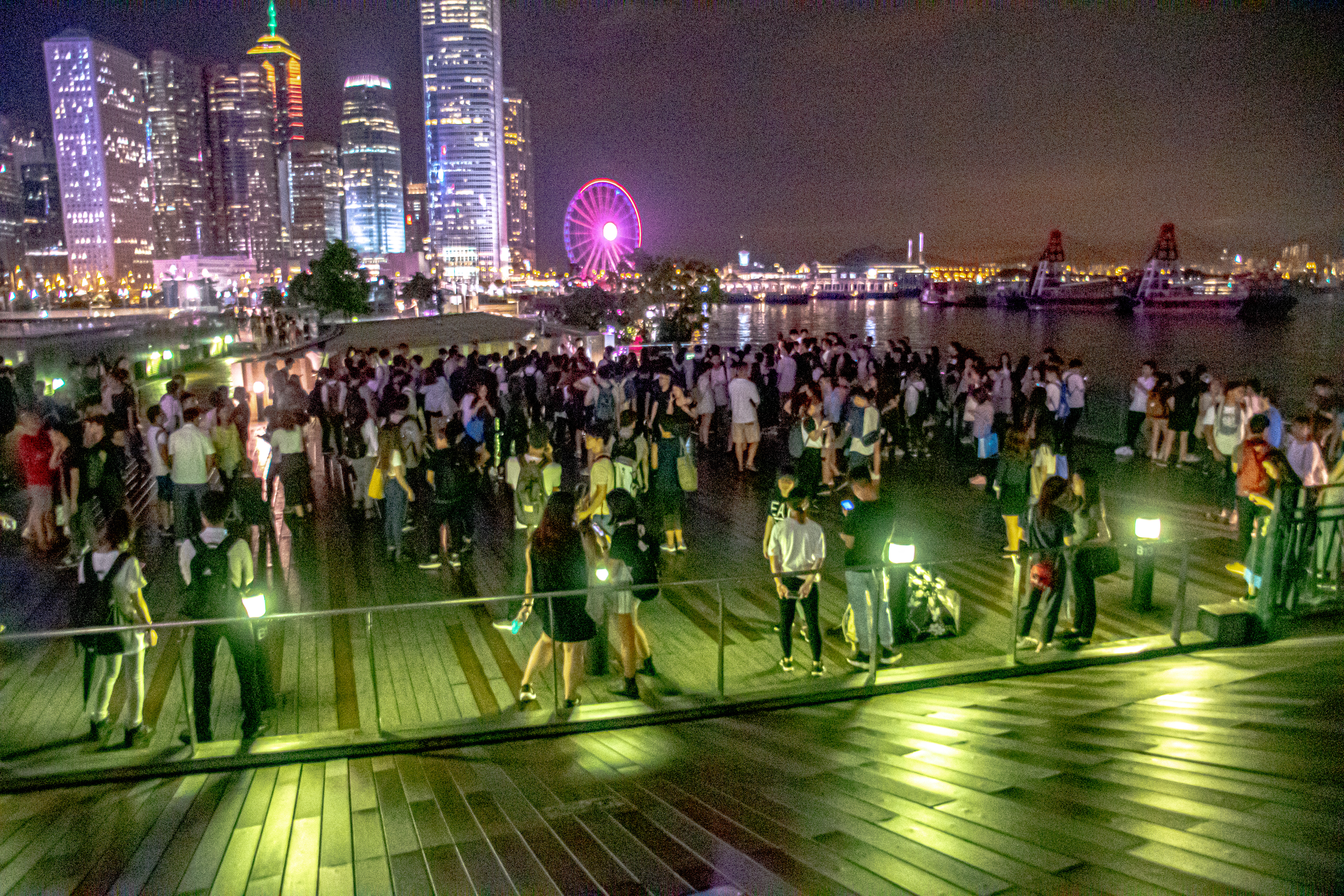 攝於2019年6月11日 22:03 添馬公園